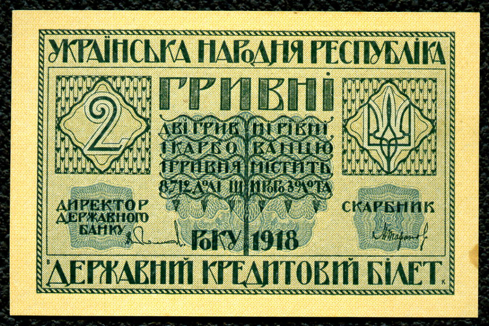 Аверс 2 гривні УНР